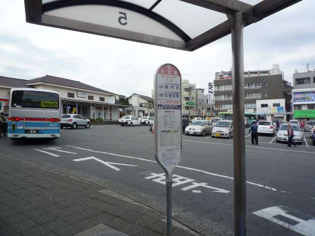 5番乗り場から駅舎方面を撮影